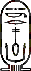 Kartuschenname des Neferkasokar in der Sakkara-Liste